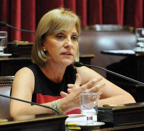 Liliana Fellner